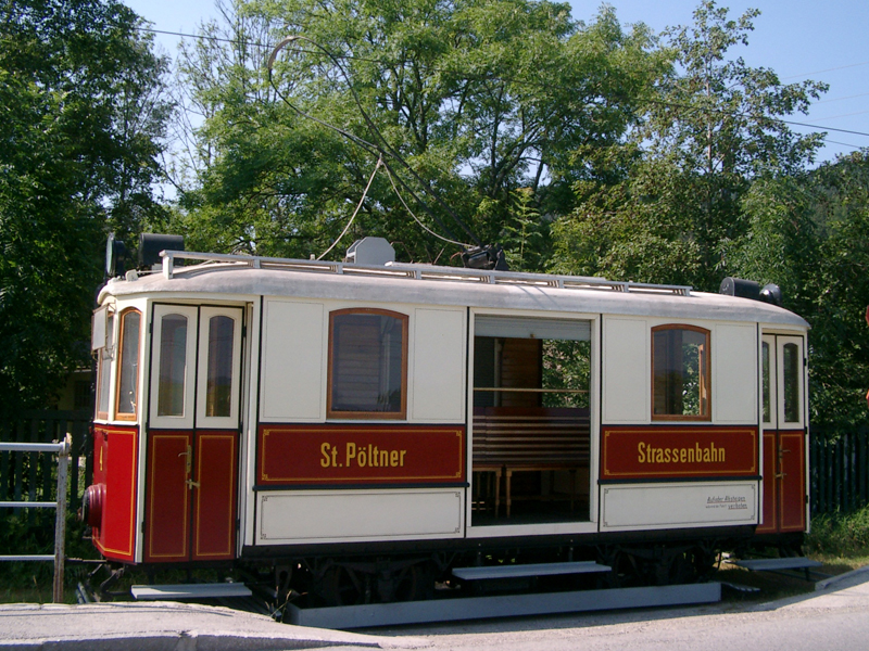 ausgestellt auf den St. Pöltner Verkehrstagen 2004